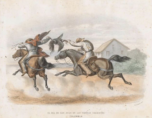 "El día de San Juan en las tierras calientes (Colombia)" Torres Méndez, Ramón Aguatinta. 26 x 33 cm, color Publicado en: Torres Méndez, Ramón Album de cuadros de costumbres París, A. De la Rue, 1860, p. 34